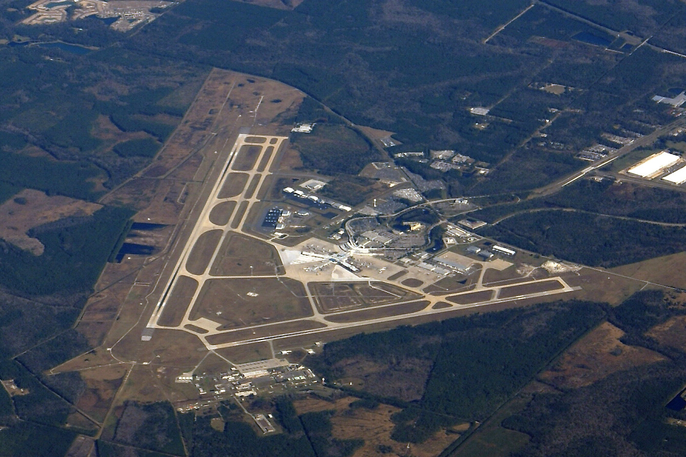 MSN 29704 B767-432 ER DELTA FLIGHT MCO-ATL